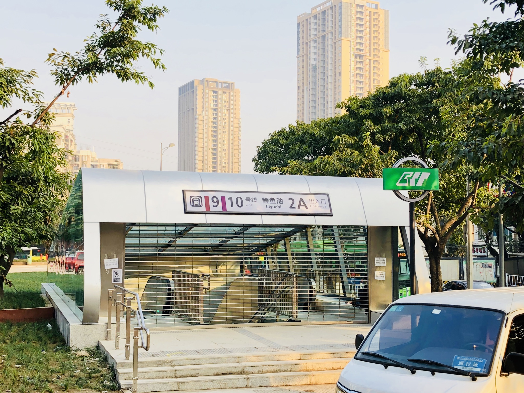 中文（中国大陆）: 即将运营的鲤鱼池站 2A 出口